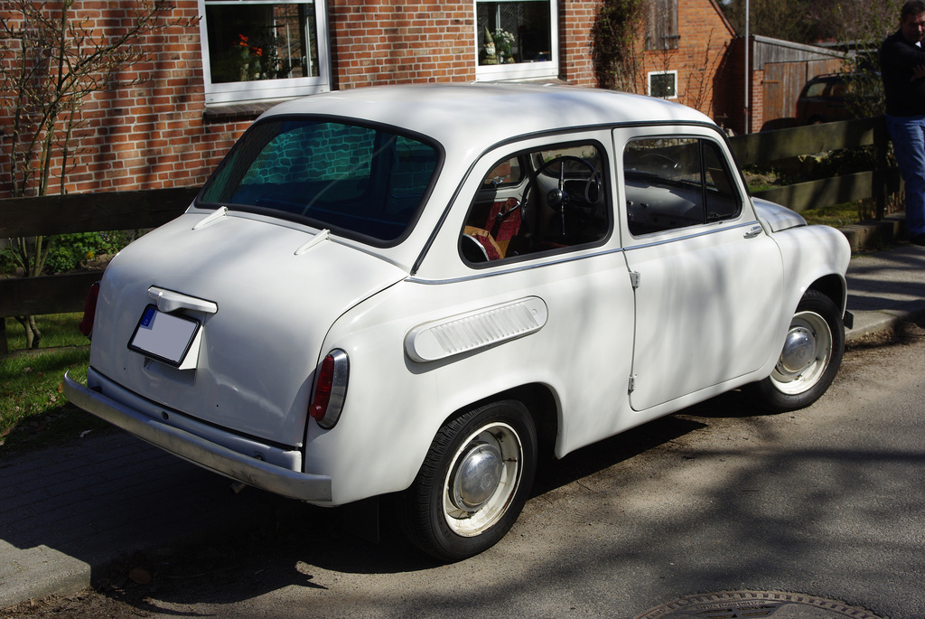 ZAZ (Saporoshez) 965A